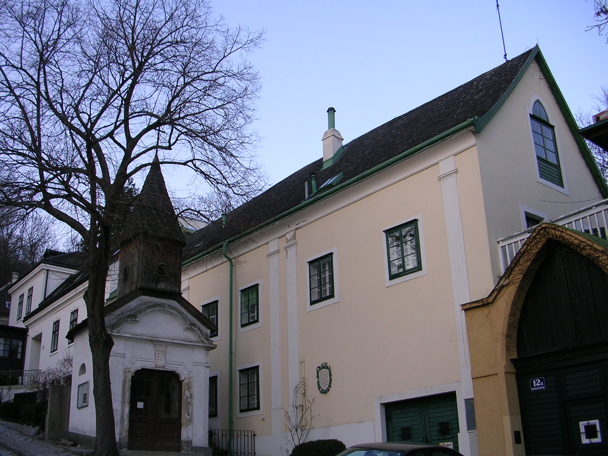 Kapelle von Salmannsdorf (Wien-Döbling)